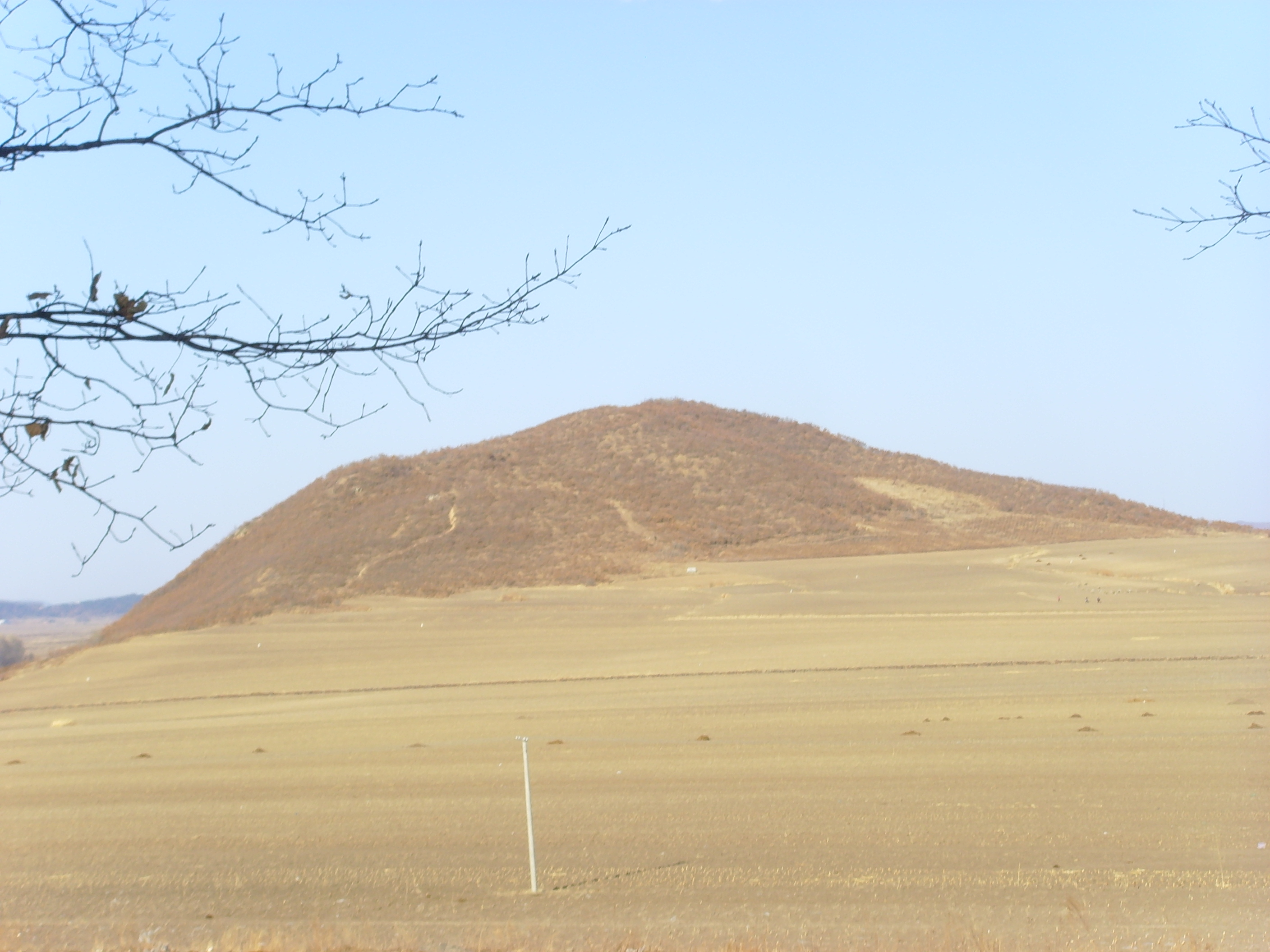 敦化东牟山(城山子山城)